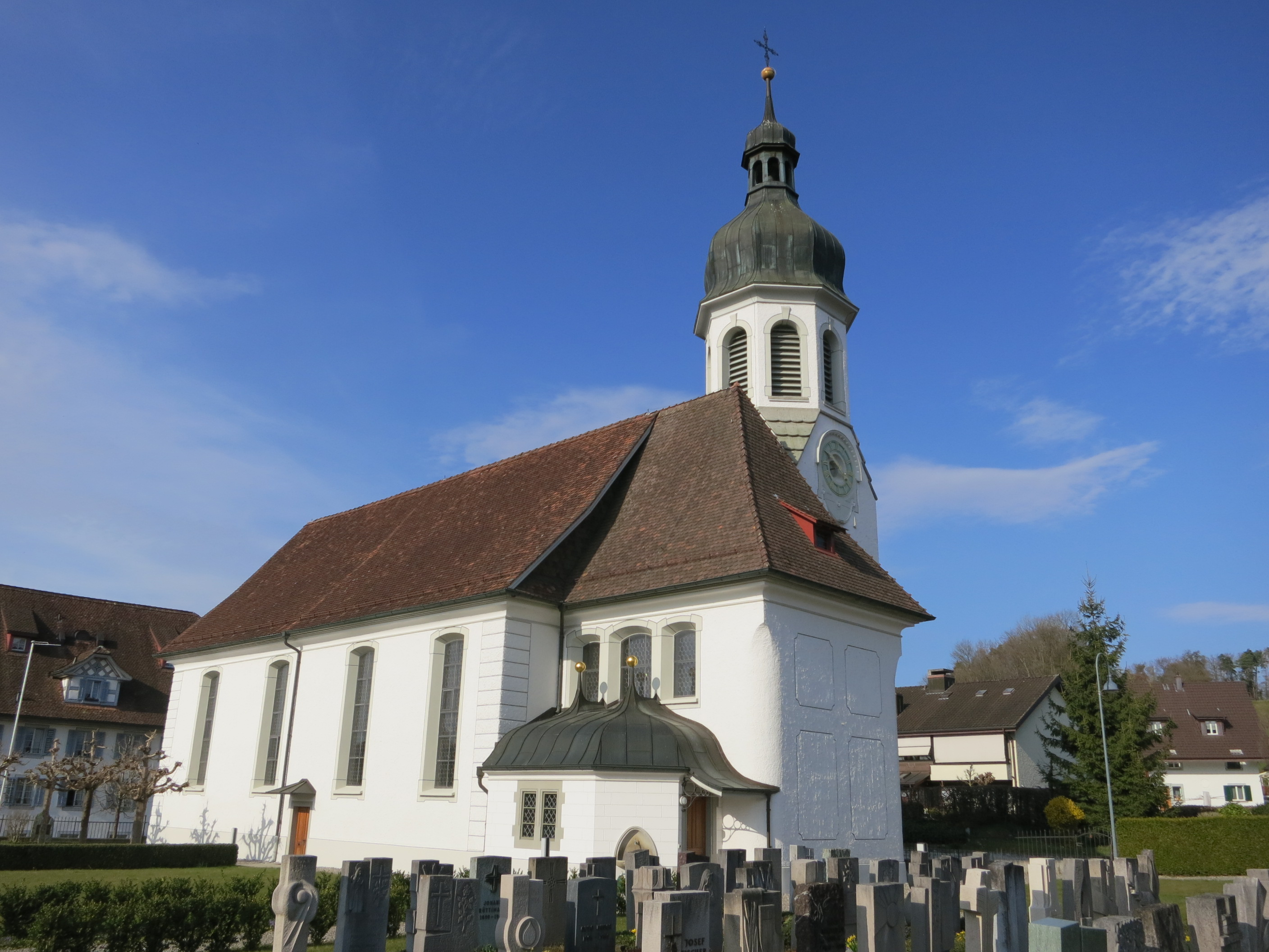 Kirche, Jonen AG, Schweiz